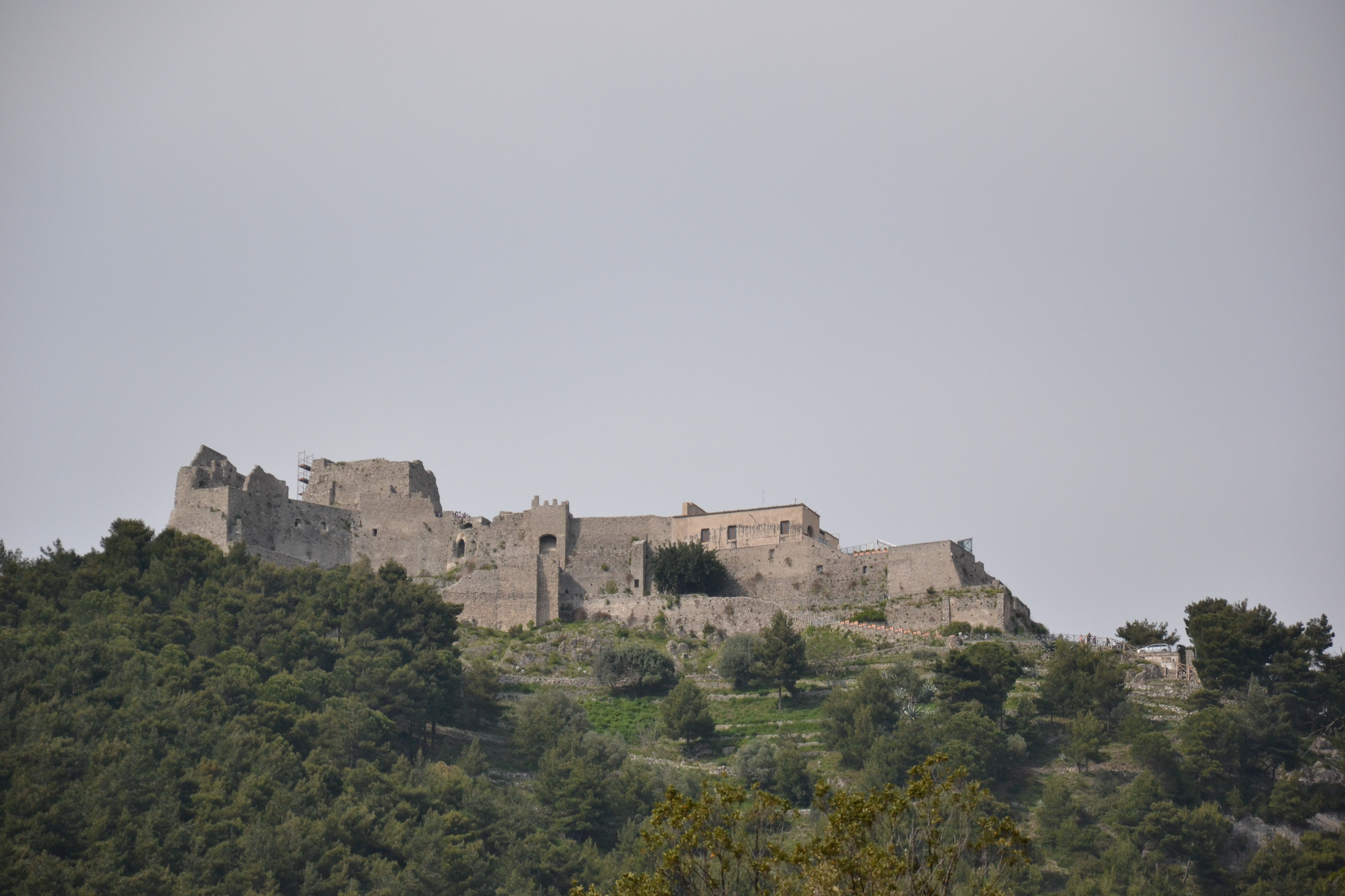 Vista del Castello Arechi II